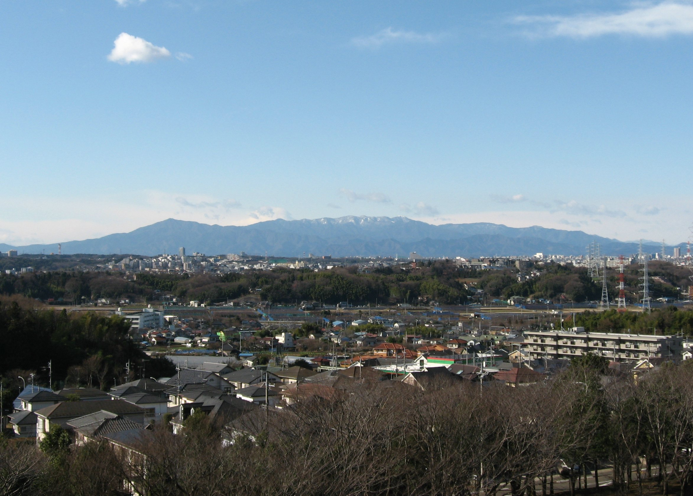 横浜市都筑区川和富士から望む丹沢山地